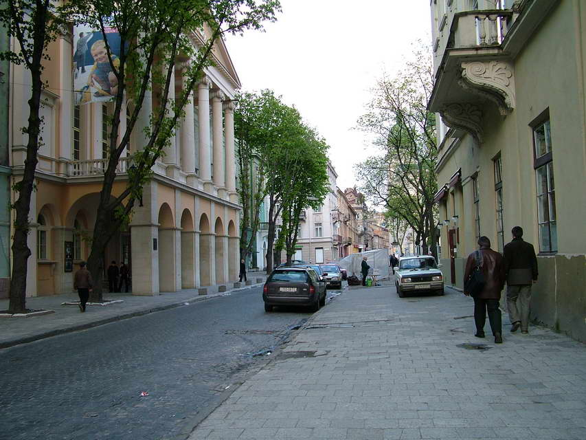 Lwów, Teatr Skarbkowski Autor fot.: Stanisław Kosiedowski, maj 2005.